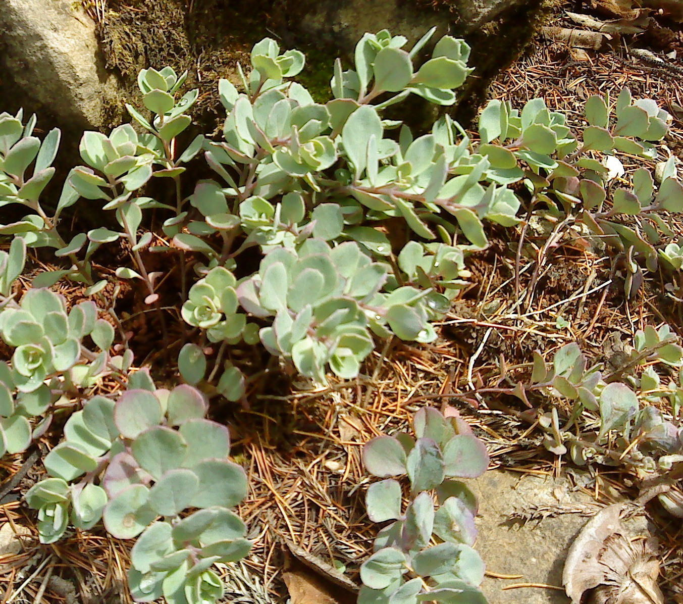 Sedum cauticolum